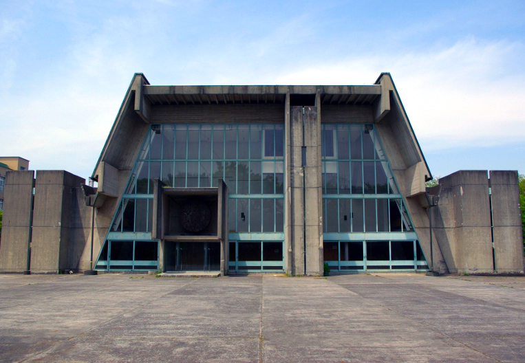 千葉大学医学部記念講堂